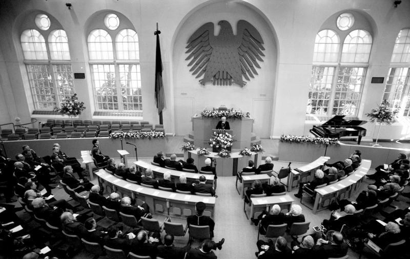 Bonn, 12. Januar 1990 Trauerstaatsakt für den am 31.12.1989 verstorbenen ehemaligen Bundesminister Dr. Gerhard Schröder. In Anwesenheit des Bundespräsidenten, des Präsidenten des Bundesverfassungsgerichts und von Mitgliedern der Bundesregierung, des Bundestages und des Bundesrates würdigten Bundestagspräsidentin Prof. Rita Süssmuth, Bundeskanzler Dr. Helmut Kohl und der frühere Bischof Dr. D. Hermann Kunst das politische Lebenswerk des Verstorbenen.